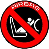 ECEエアバッグ警告ラベル